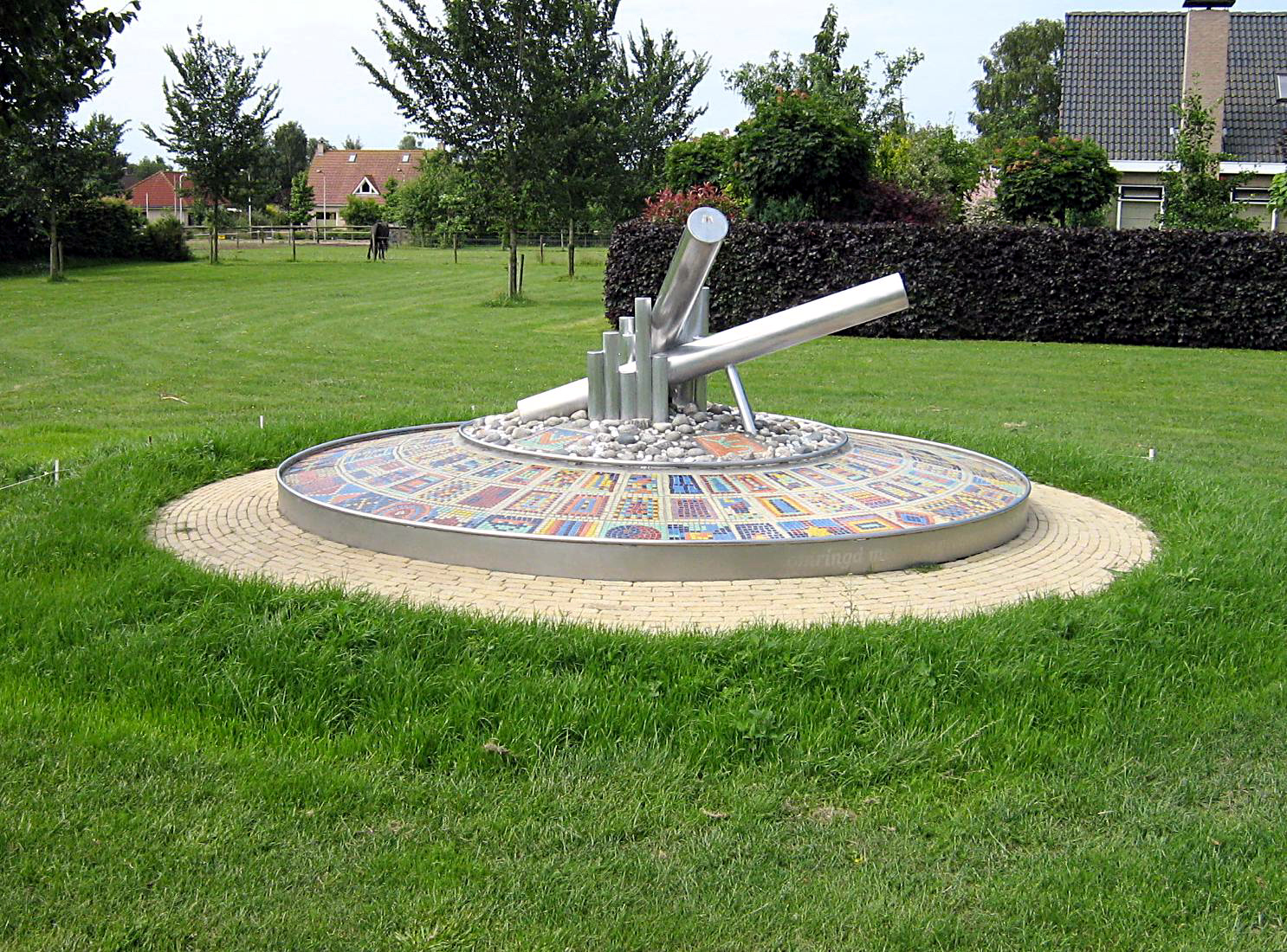 Onbekend,2007